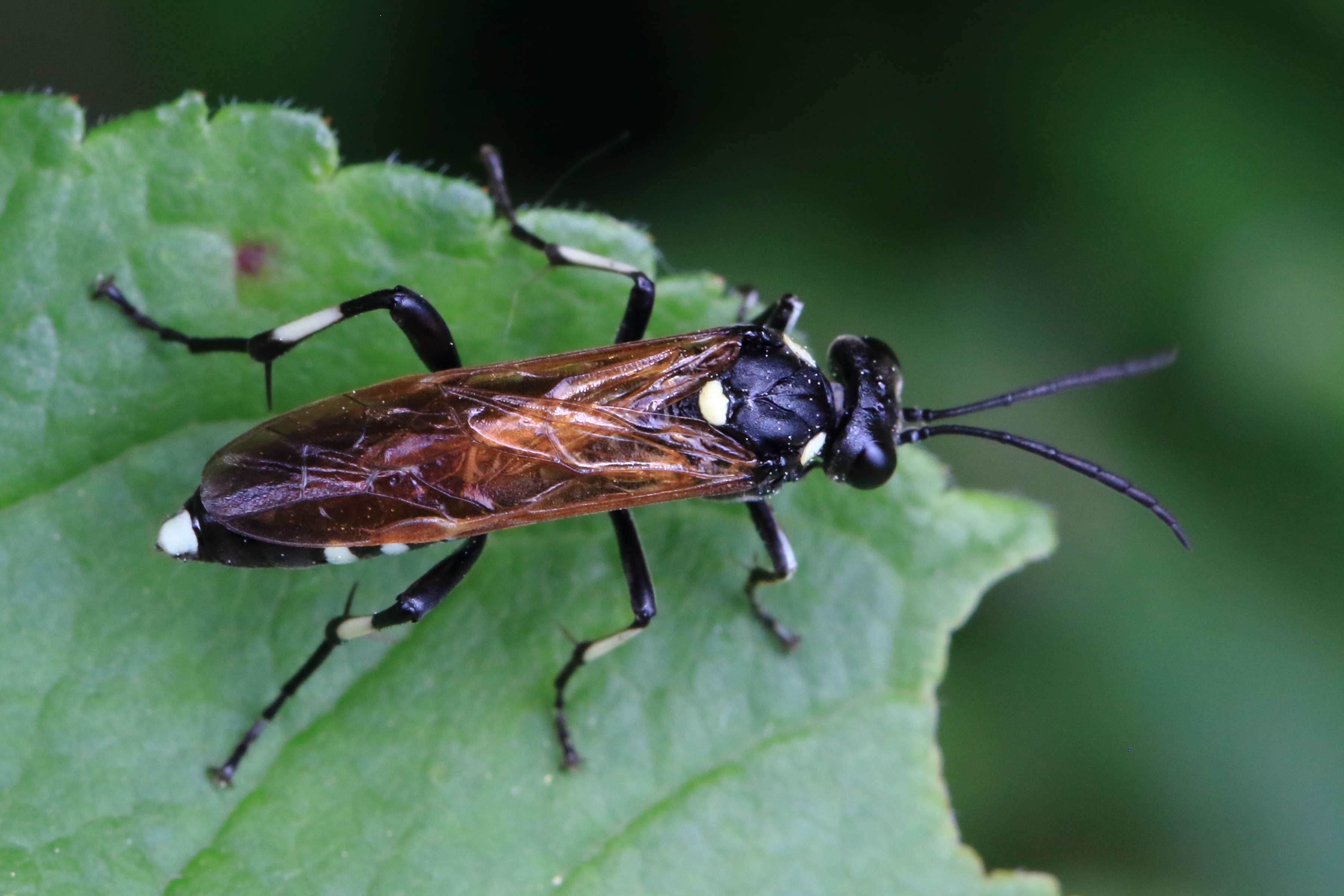 Blattwespe Macrophya diversipes, aus der Familie der Echten Blattwespen Tenthredinidae, ca. 10-12mm (?). Aufgenommen am Rand des Gruppenbachs Das abgebildete Insekt wurde am 9. Juni 2016 von Ewald Jansen auf entomologie.de bestimmt, auf Grund meiner (Norbert) Anfrage dort vom 7. Juni 2016 The insect shown here has been identified by Ewald Jansen on entomologie.de 2016, June 9th, my (Norbert) question there dated 2016, June 7th